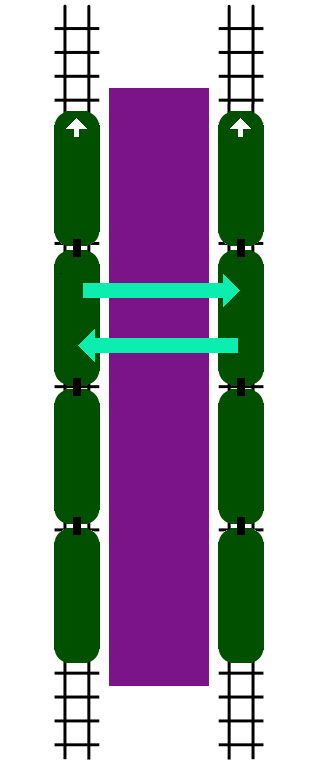 Schematische weergave van een perron met cross-platform-overstap